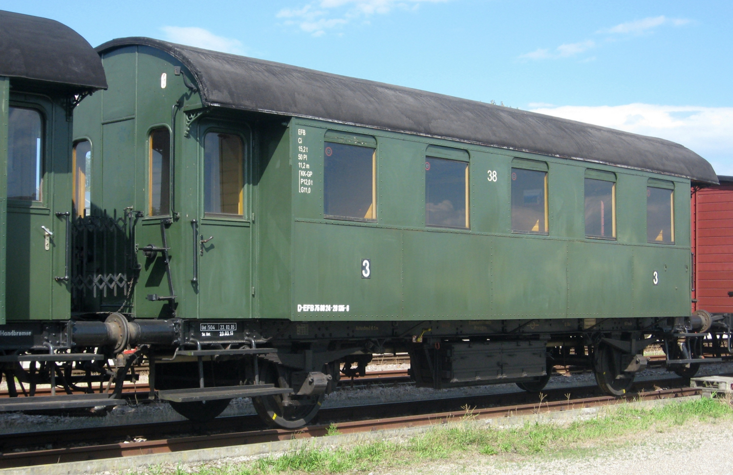 Durchgangs-Personenwagen 3. Klasse ex Süddeutsche Eisenbahn-Gesellschaft (SEG), Waggonfabrik Gastell 1926, heute Ci 38 Museumsdampfzug Rebenbummler, Kaiserstuhlbahn